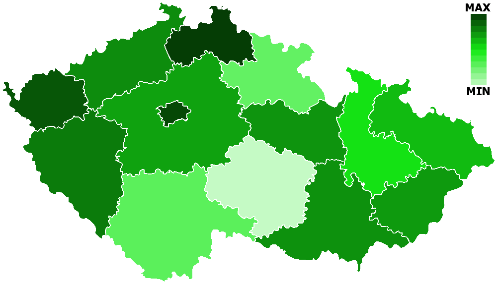 Mapa rozdělení podle procent pohanů na všechny obyvatele v příslušných krajích (max=0,013%; min=0,005%)